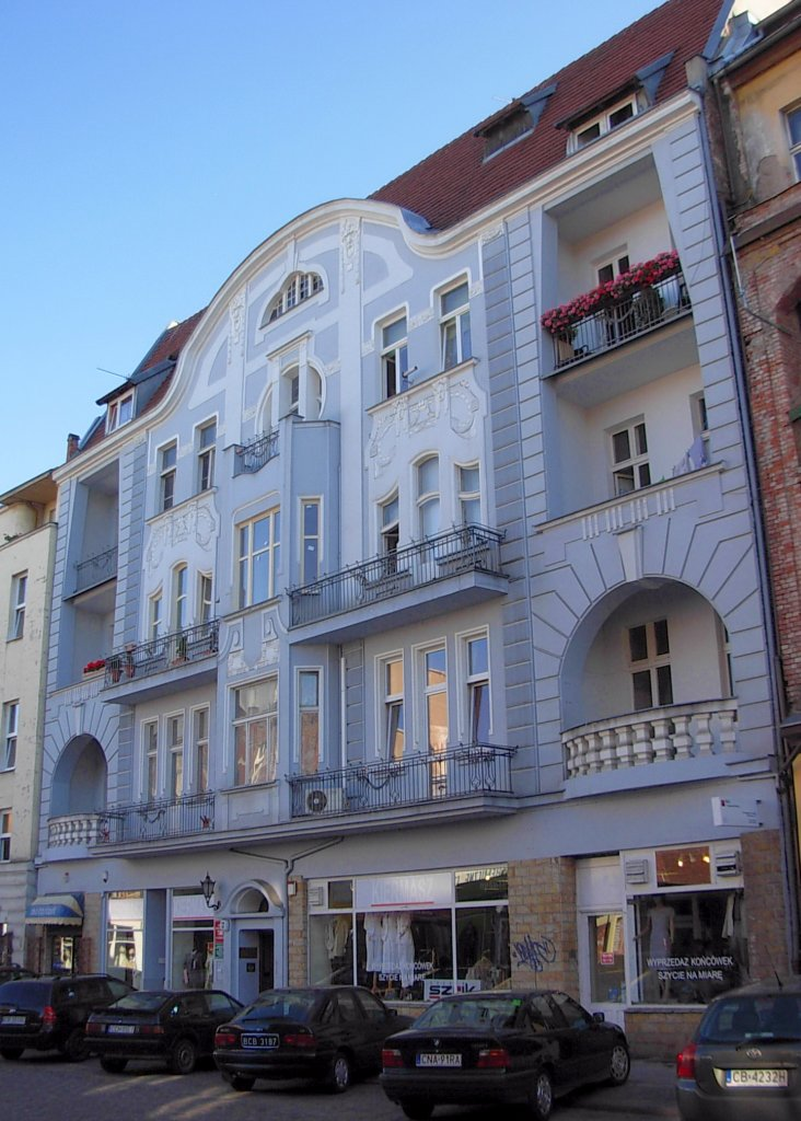 Kamienica ul. Dworcowa 45 w Bydgoszczy